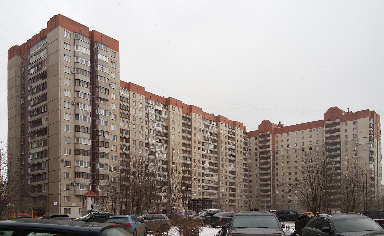 Жилой дом в Санкт-Петербурге по ул. Звёздная, 5